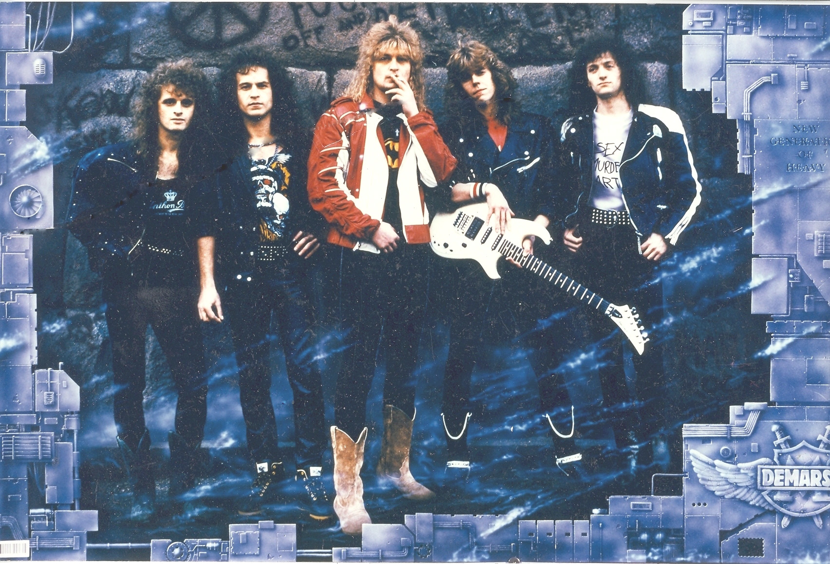 Группа «Демарш». 2010 год